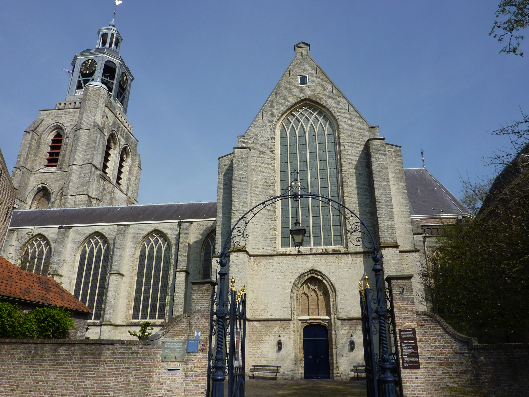 Sint-Gertrudiskerk (Bergen op Zoom)